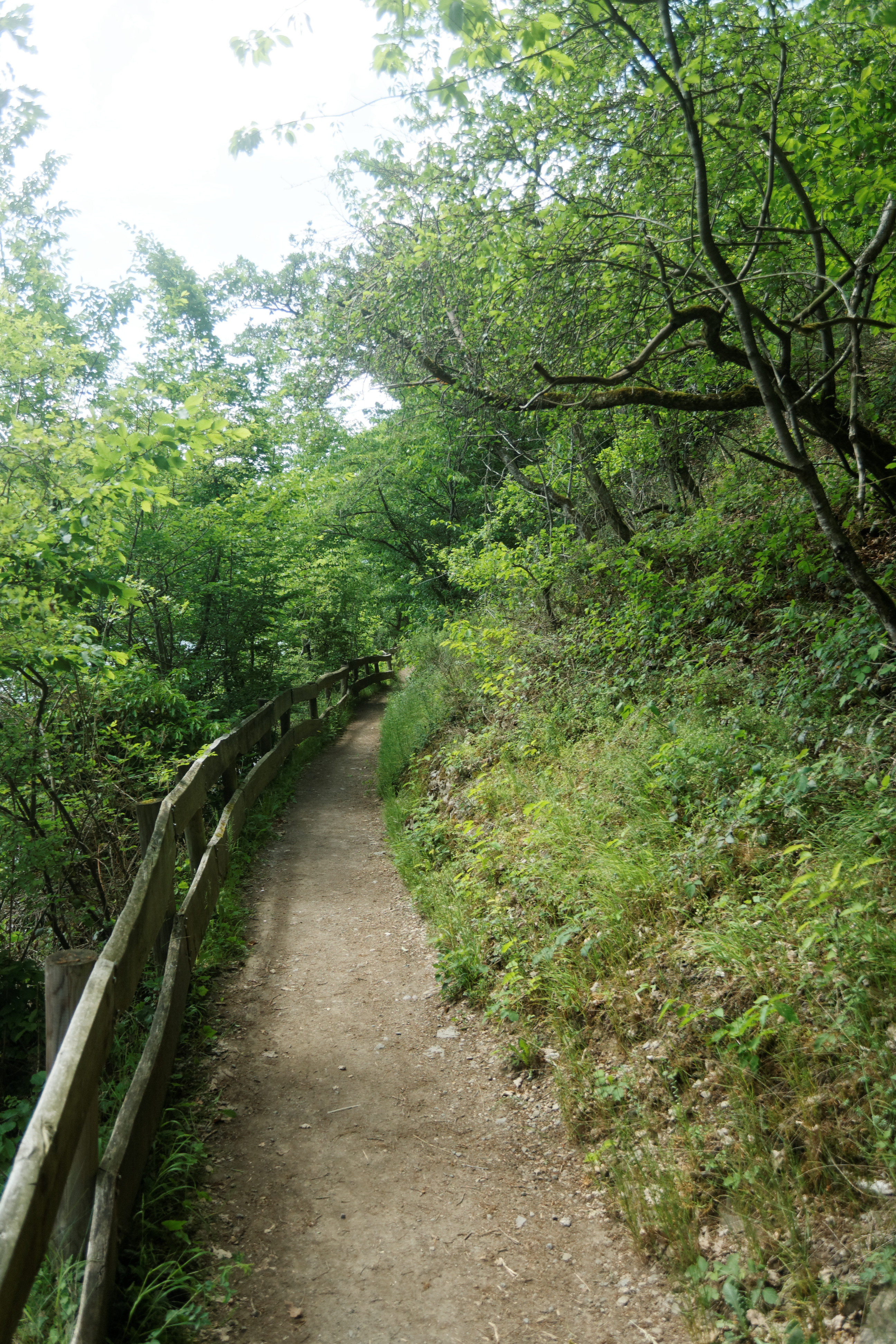 Wanderweg entlang des Staubeckens Heimbach am Meuchelberg